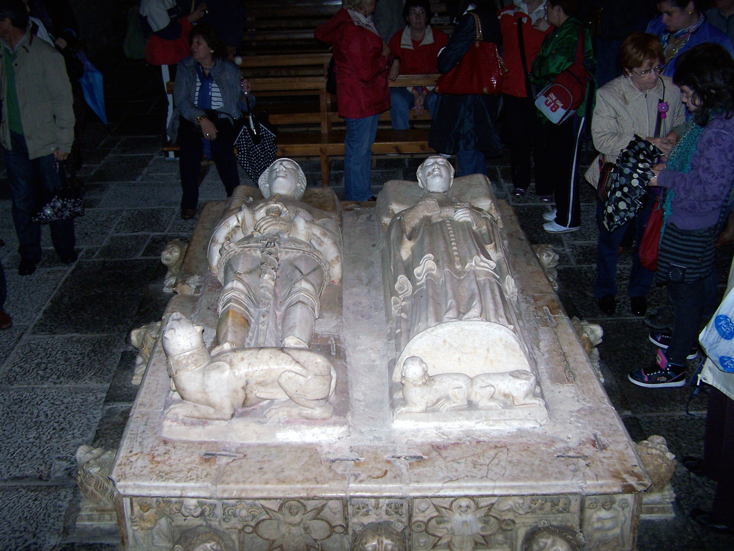 Sepulcro del cronista Pedro López de Ayala (1332-1407) y de su esposa Leonor de Guzmán, en el torreón-capilla de la Virgen del Cabello, conjunto paleciego-conventual de Quejana, provincia de Álava.